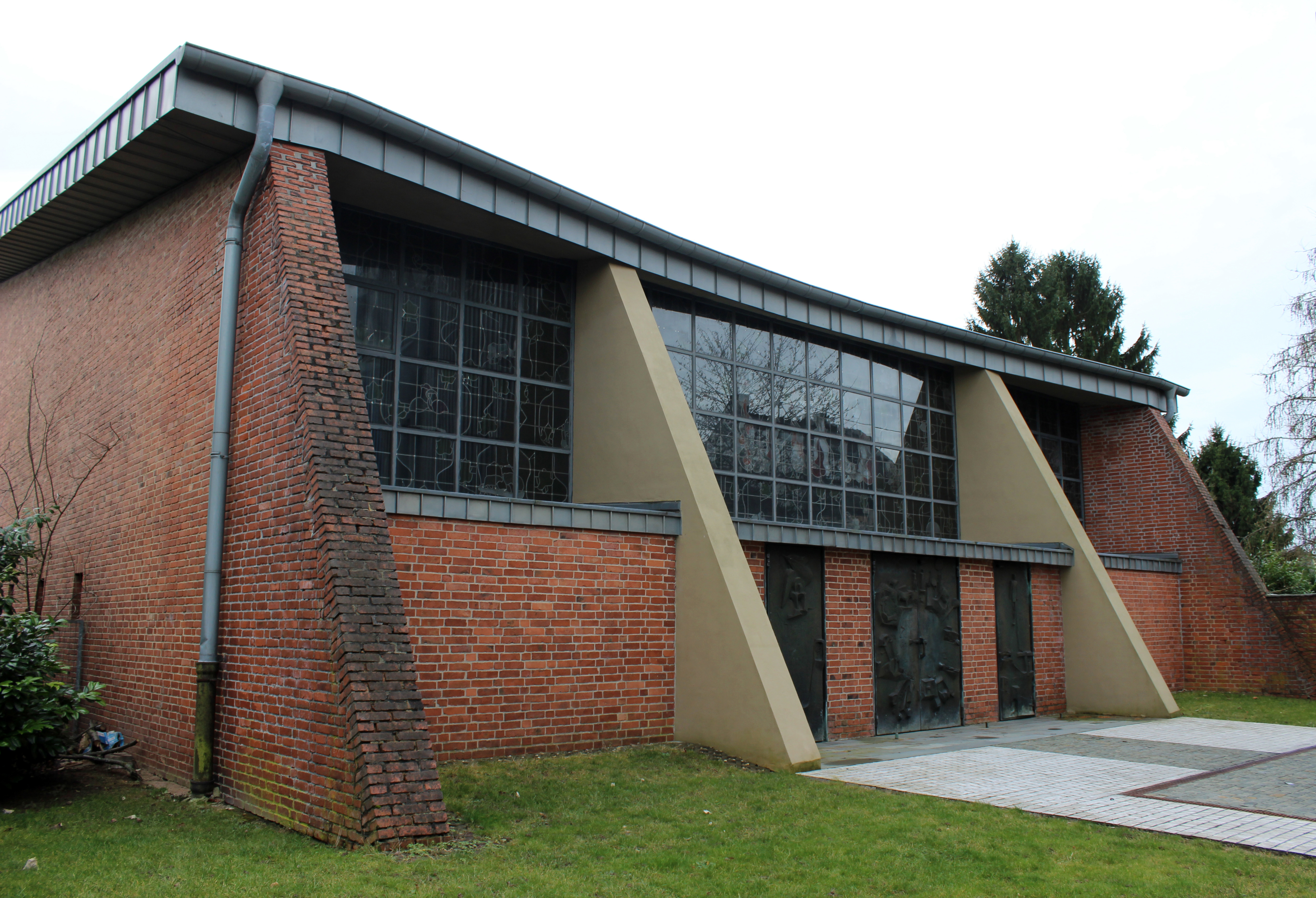 Die katholische Kirche St. Hildegard in Neuweiler, einem Stadtteil von Sulzbach (Saar), Regionalverband Saarbrücken, Saarland